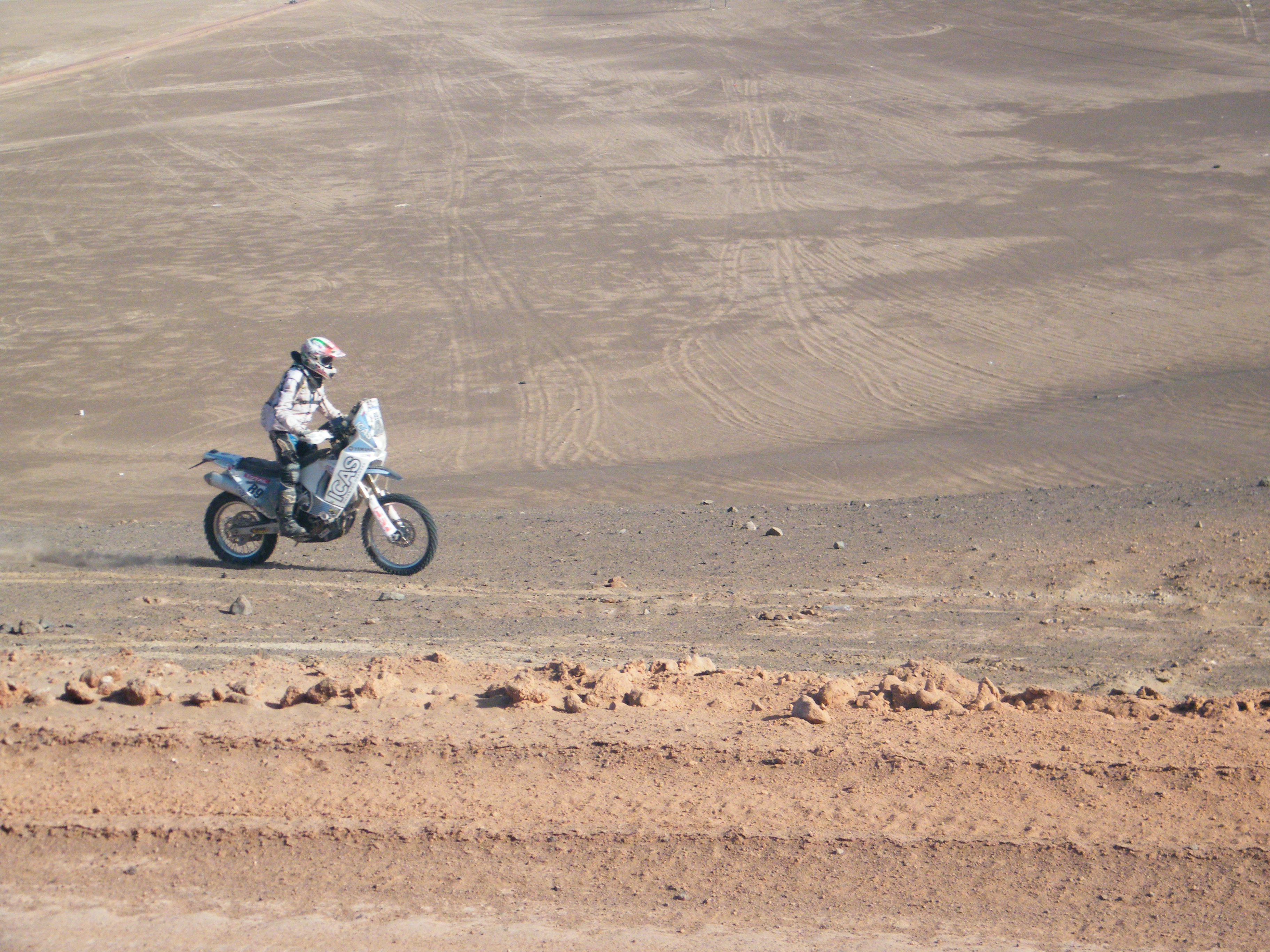 dakar 2011